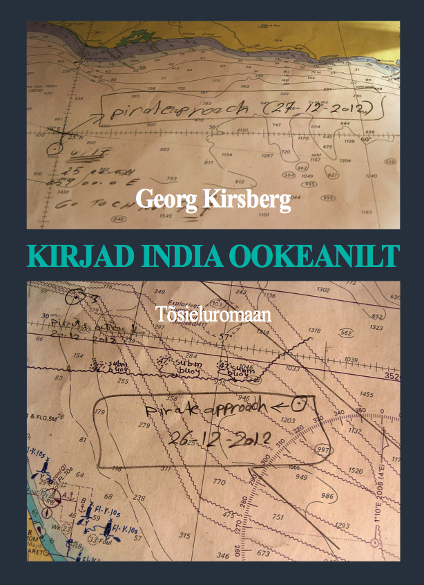 Kirjad India ookeanilt esikaas.